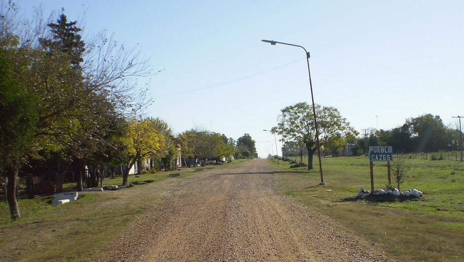 Entrada a Pueblo Cazes desde Clara hacia las 4 bocas. Entrada Este Sud Este.